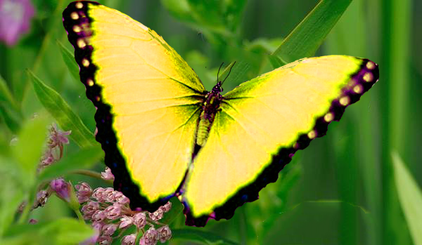 Золотокрила кубка